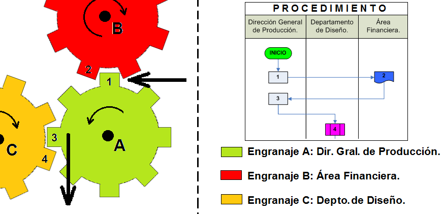 Ejemplo de la relación que existe entre los equipos de trabajo y los procedimientos.